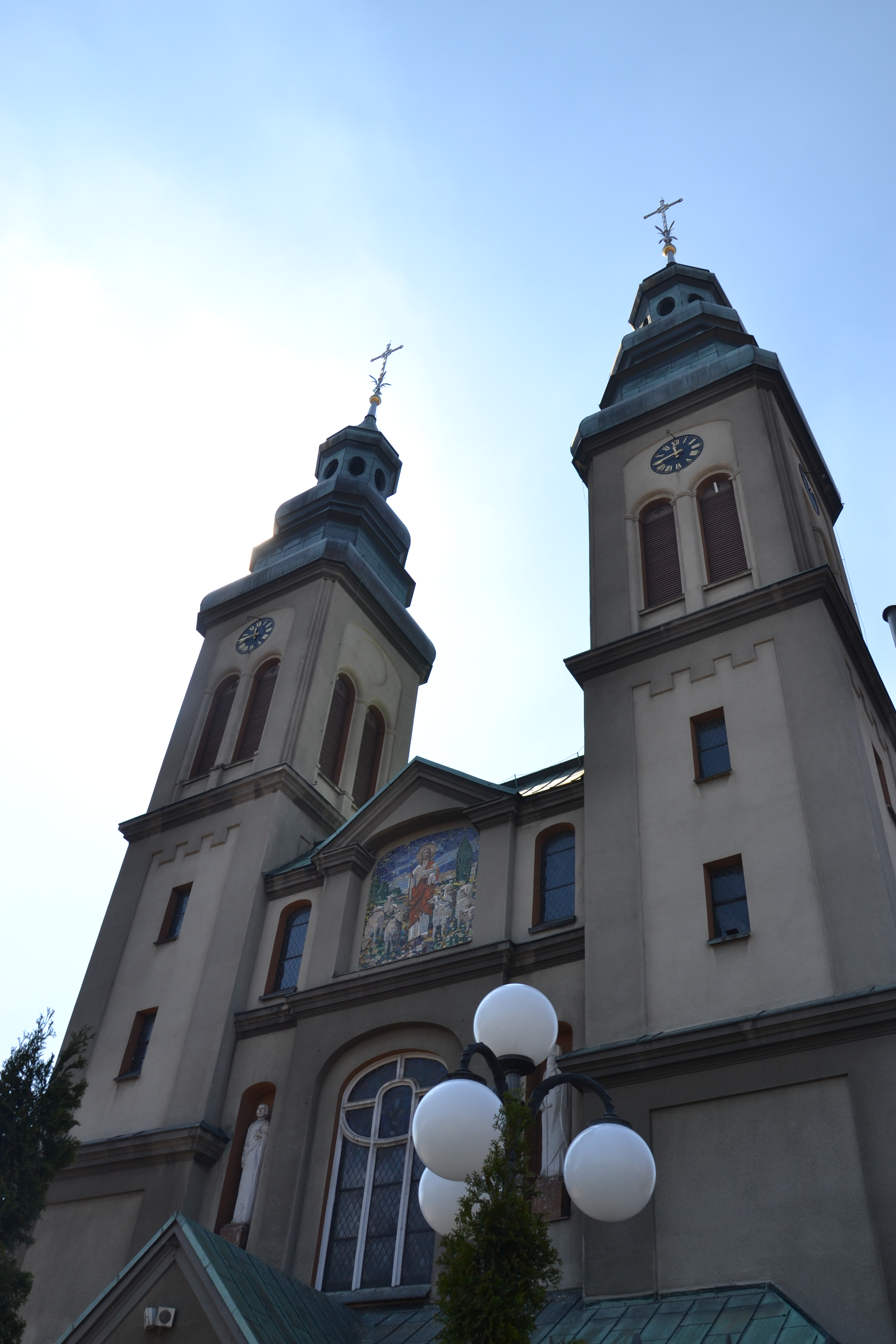 Kościół pw. WNMP w Radlinie-Biertułtowach